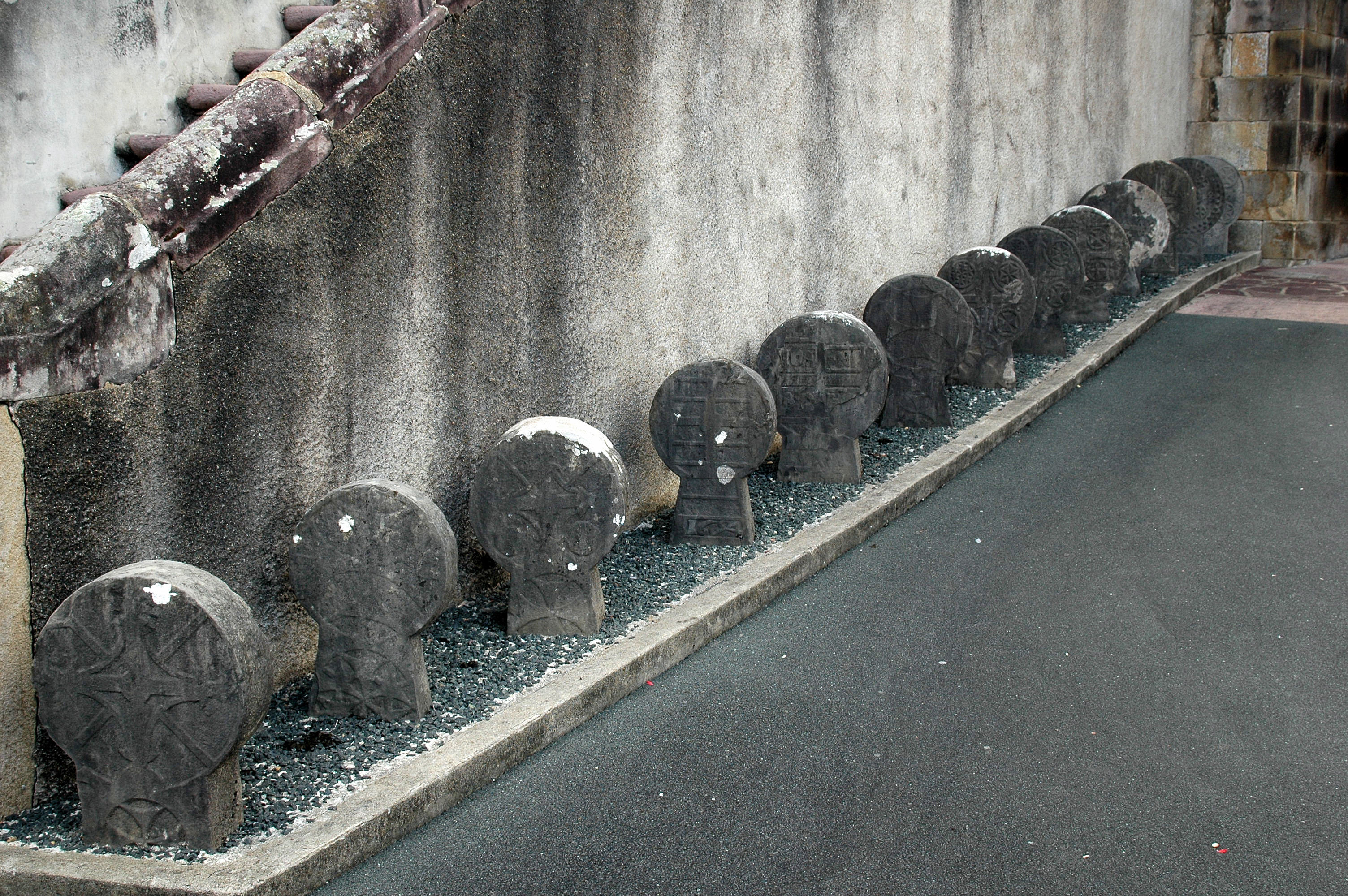 Louhossoa, stèles discoïdales. Photo prise le 03/08/06 par Harrieta171